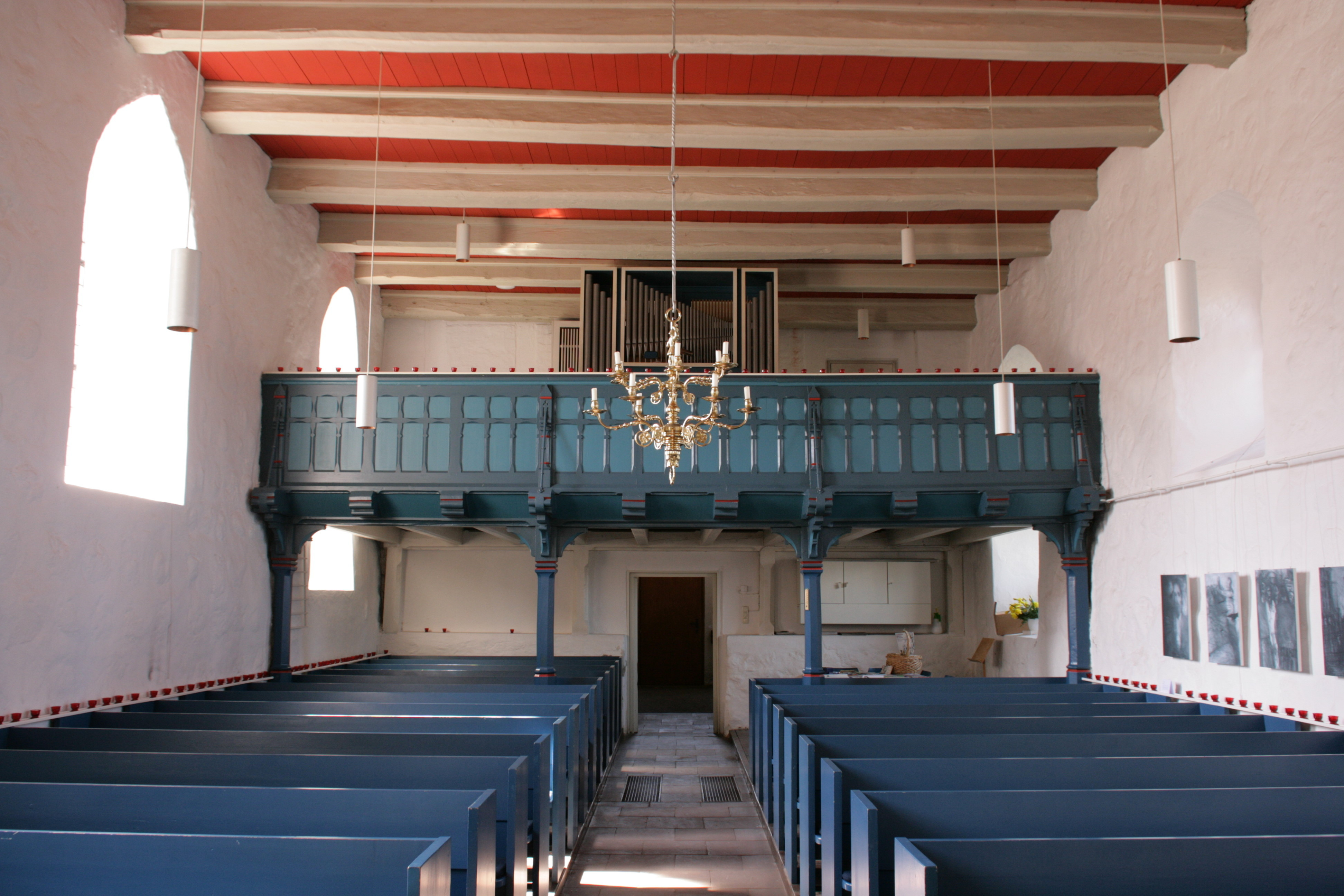 St.-Georgs-Kirche an der Billungstraße in Wichmannsburg, Bienenbüttel